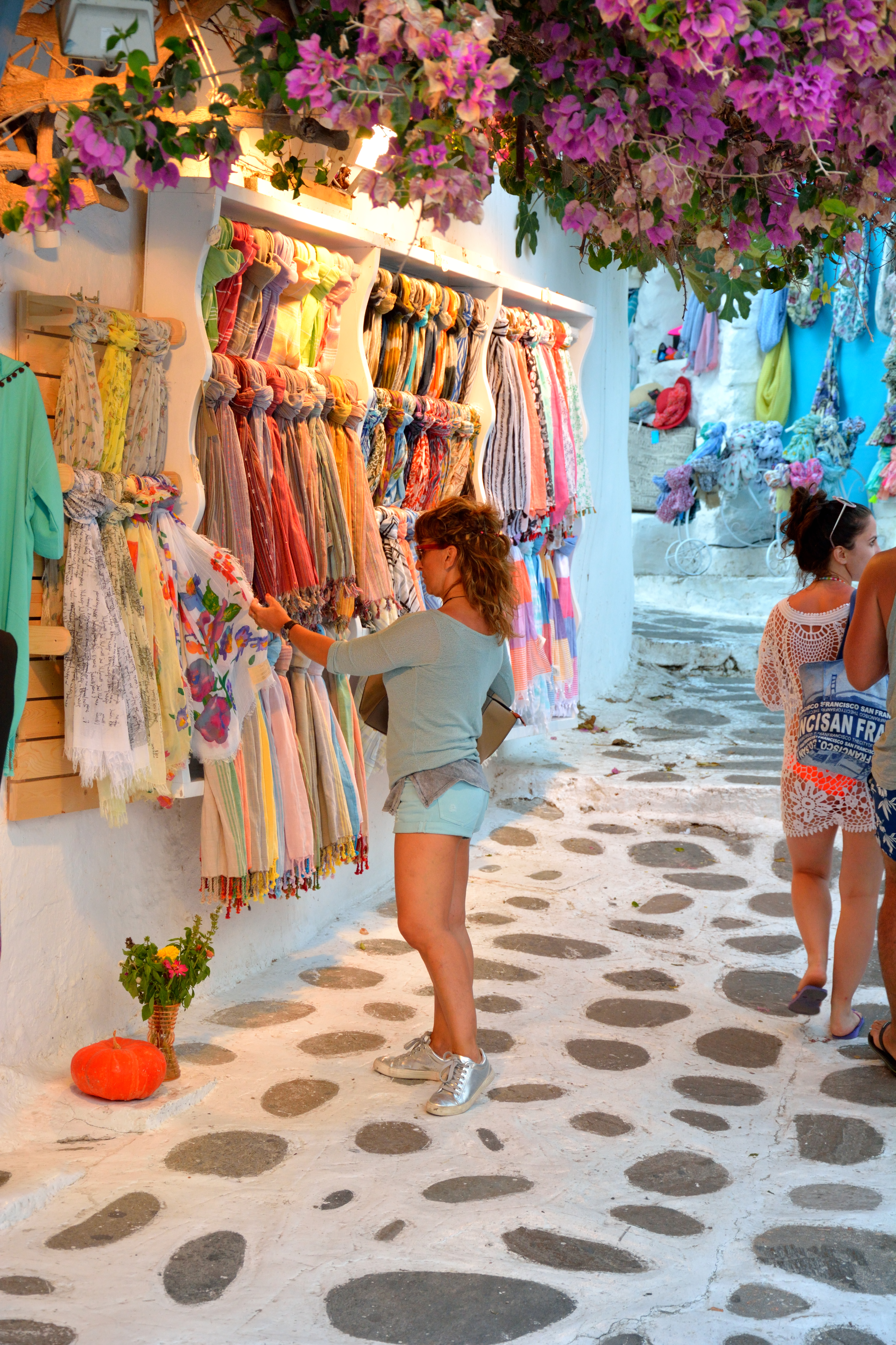 Mikonos, compras al atardecer